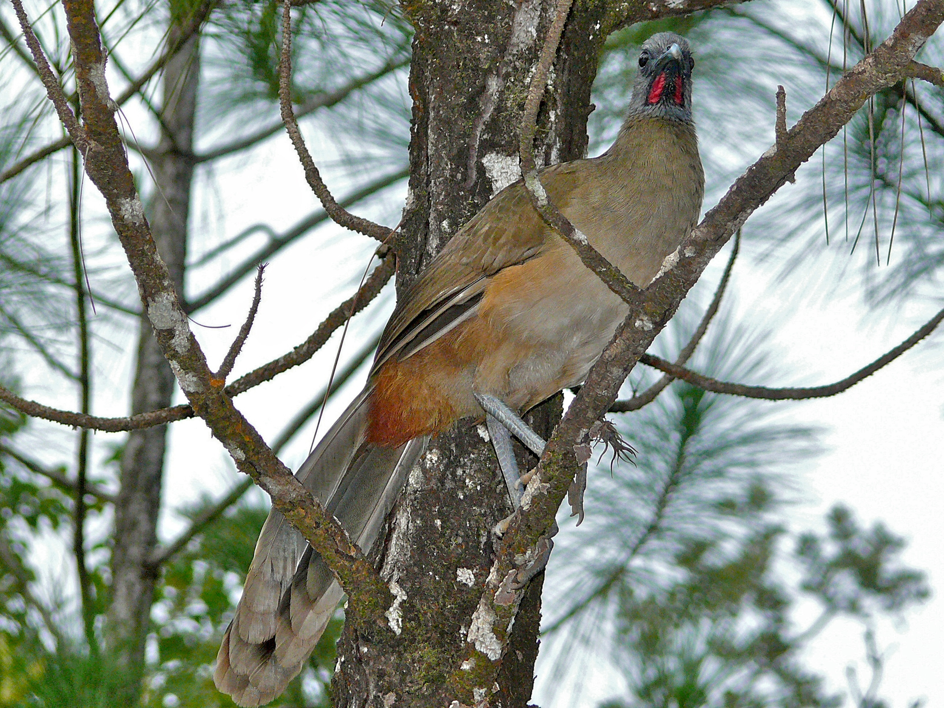 Belize Zoo, BELIZE